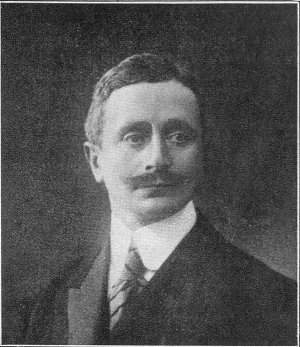 Portrait du député Camille Picard à l'Assemblée Nationale au lendemain des élections législatives de mai 1910